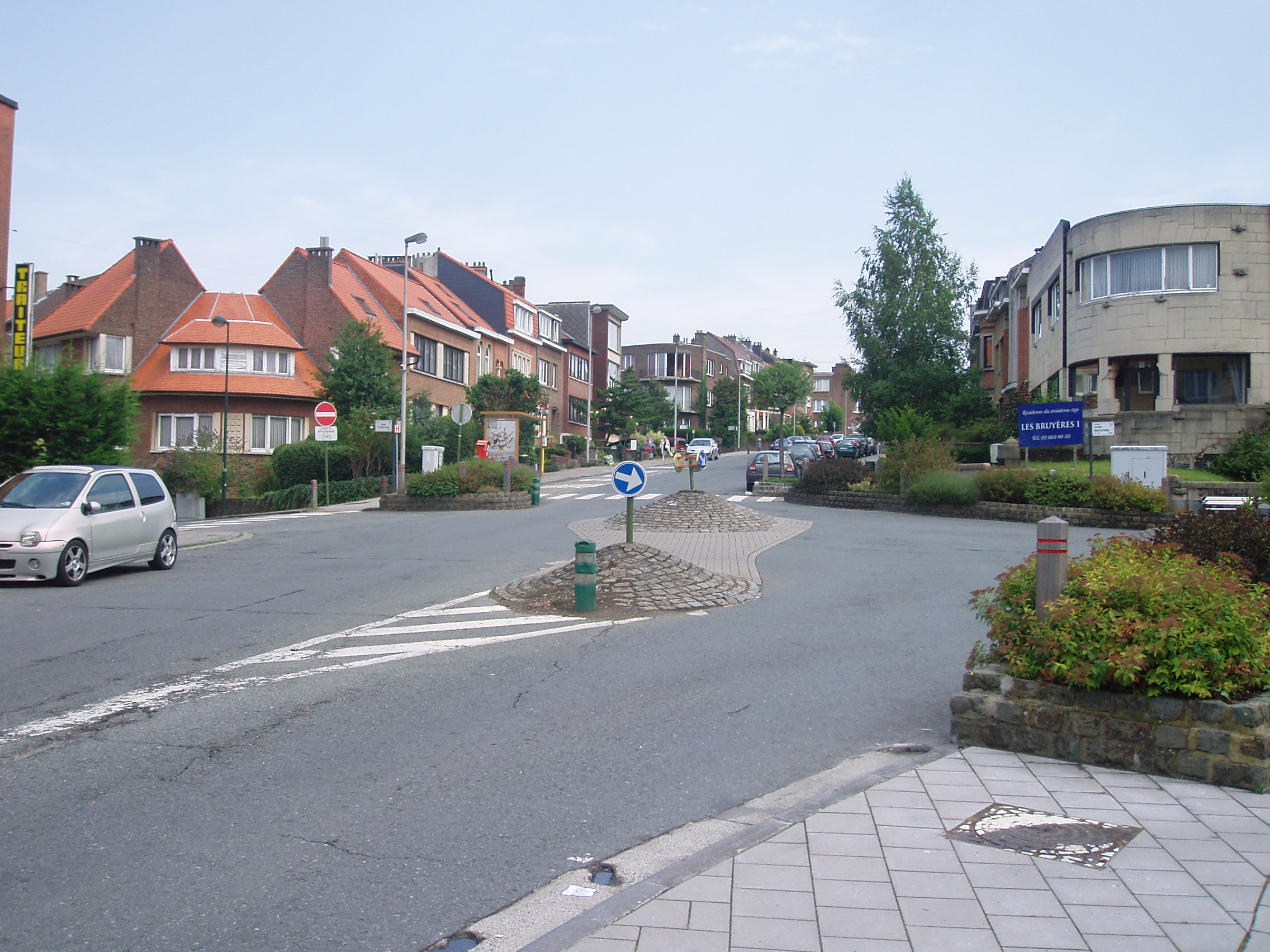 avenue Joseph Chaudron Auderghem Belgium